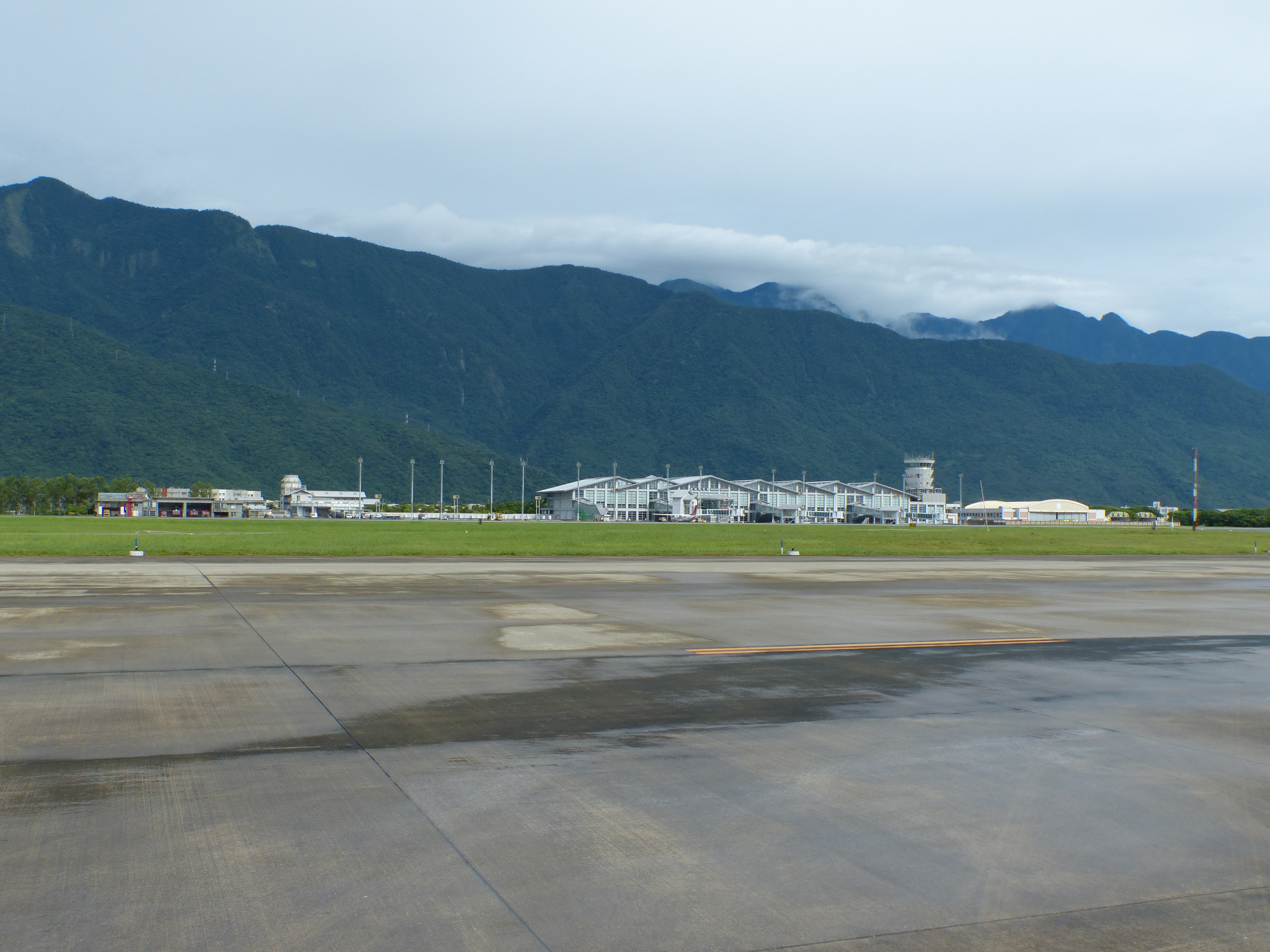 從空軍花蓮基地停機坪西望花蓮機場航站全景。